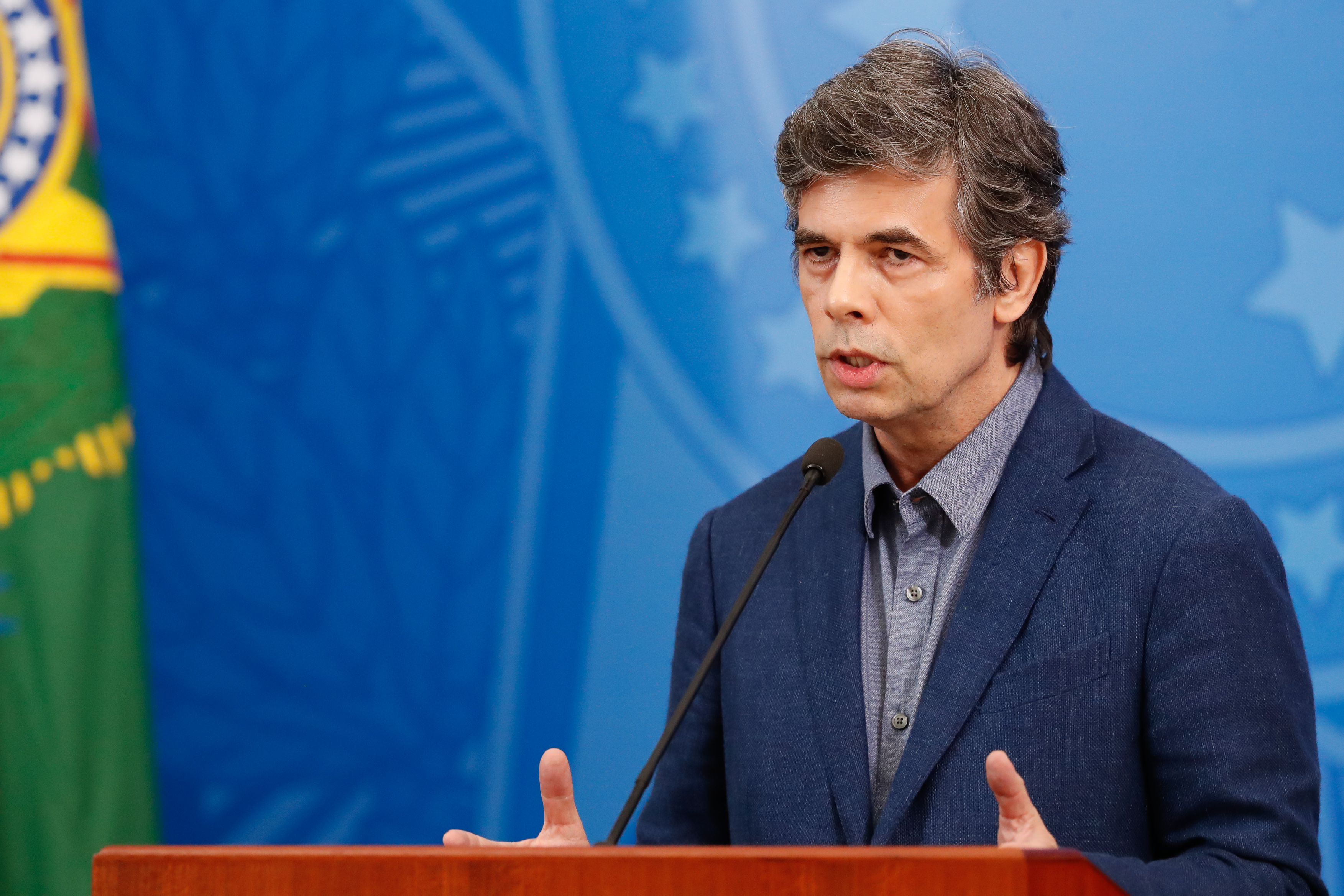 (Brasília - DF, 16/04/2020) Palavras do Oncologista, Nelson Teich.Foto: Alan Santos/PR